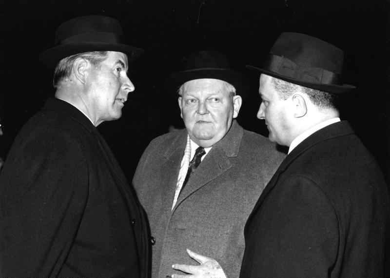 1.3.1964 Bundeskanzler Professor Dr. Ludwig Erhard mit Bundesaußenminister Gerhard Schröder (li.) und Rainer Barzel, amtierender Vorsitzender der CDU/CSU- Fraktion, auf dem Bonner Bahnhof vor der Abreise nach Den Haag